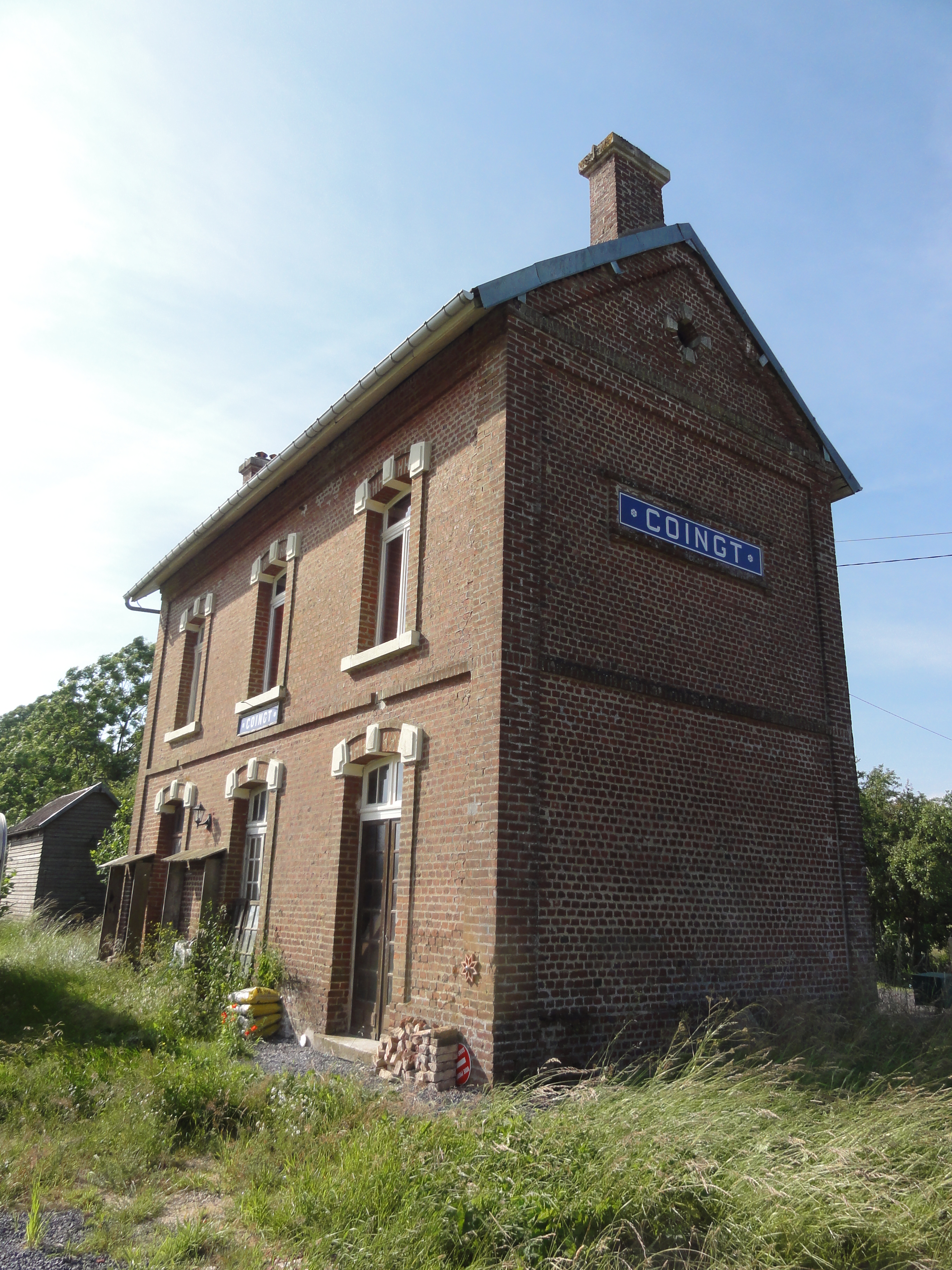 Coingt (Aisne) ancienne gare